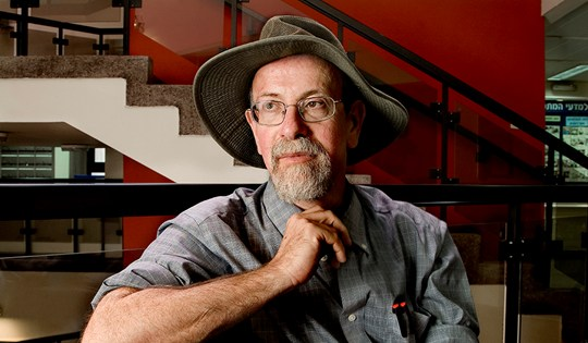 פרופסור למדעי המחשב מיכה שריר